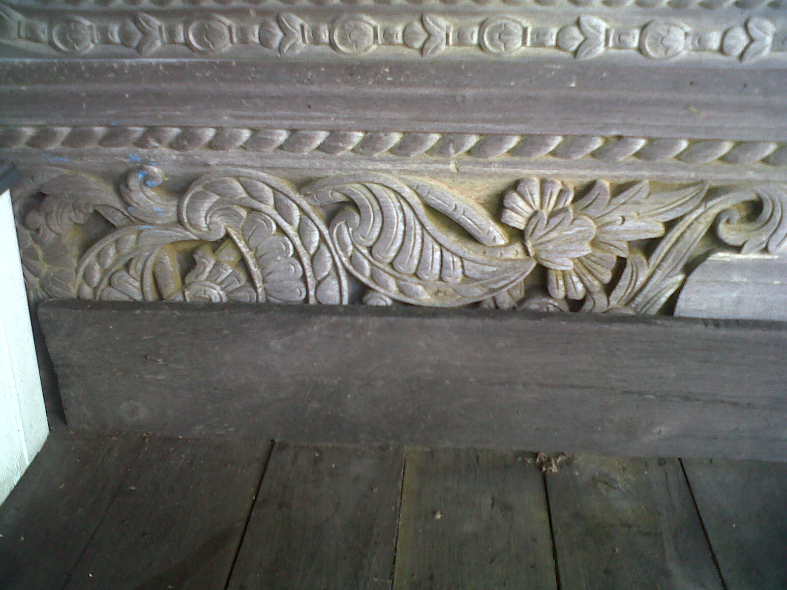 Ornamen ukiran pada Tawing Hadapan Rumah Bubungan Tinggi Desa Habirau